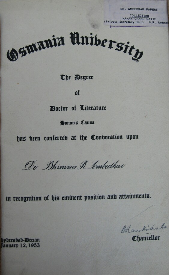 हैदराबादच्या उस्मानिया विद्यापीठाकडून डॉ. बाबासाहेब आंबेडकर यांना दिलेल्या डी.लिट्. या मानद पदवीचे प्रमाणपत्र